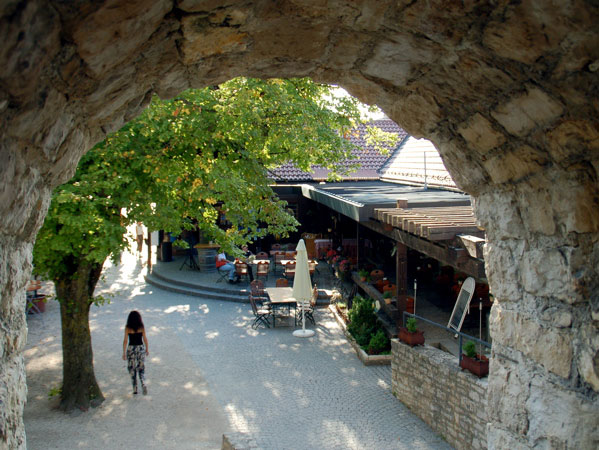 Hohenneuffen, near Stuttgart